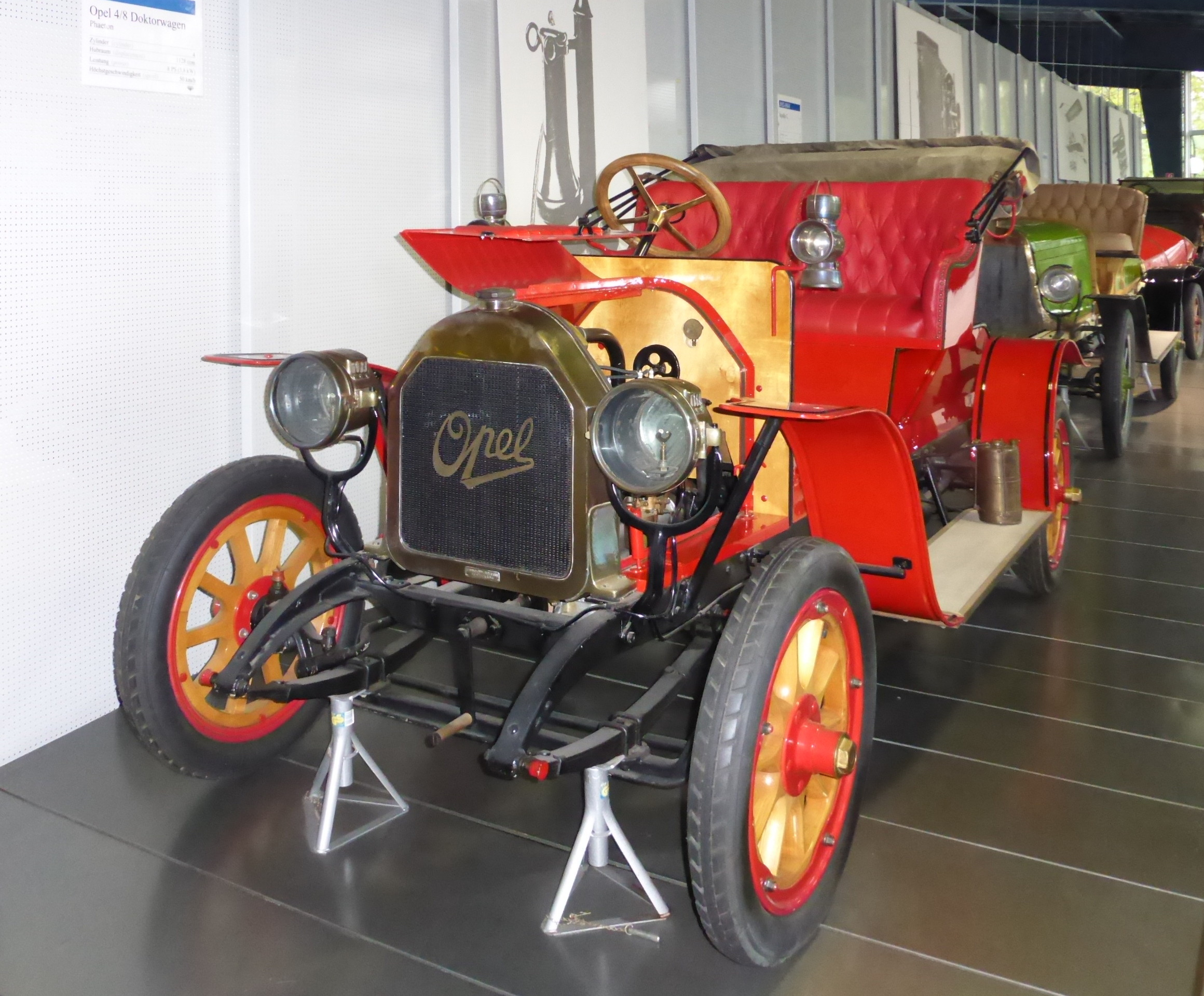 Opel 4/8 PS (Doktorwagen) Phaeton, 1909, im EFA-Museum für Deutsche Automobilgeschichte (Amerang).